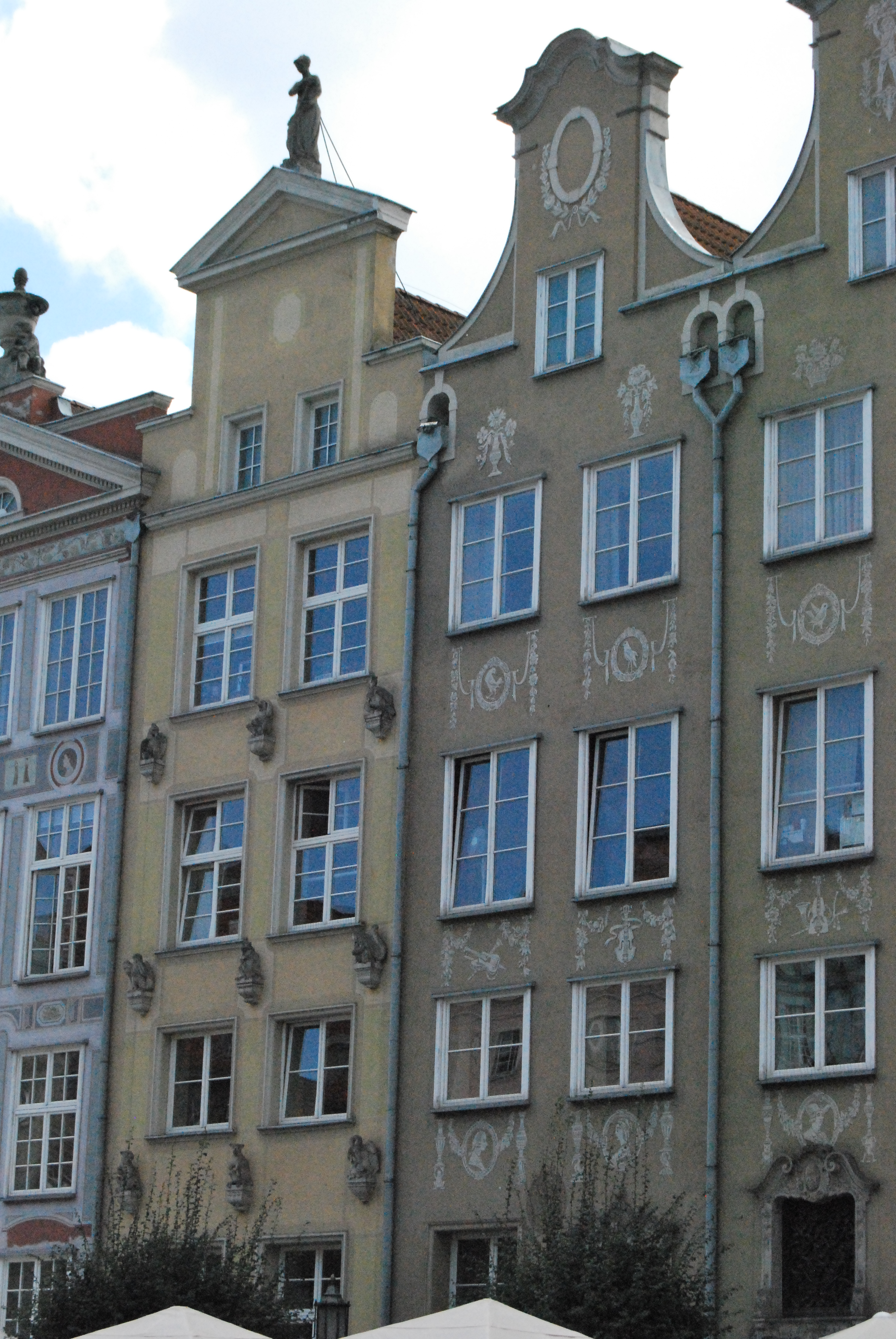 Gdańsk Główne Miasto - kamienice mieszczańskie przy Długim Targu 6 i 7